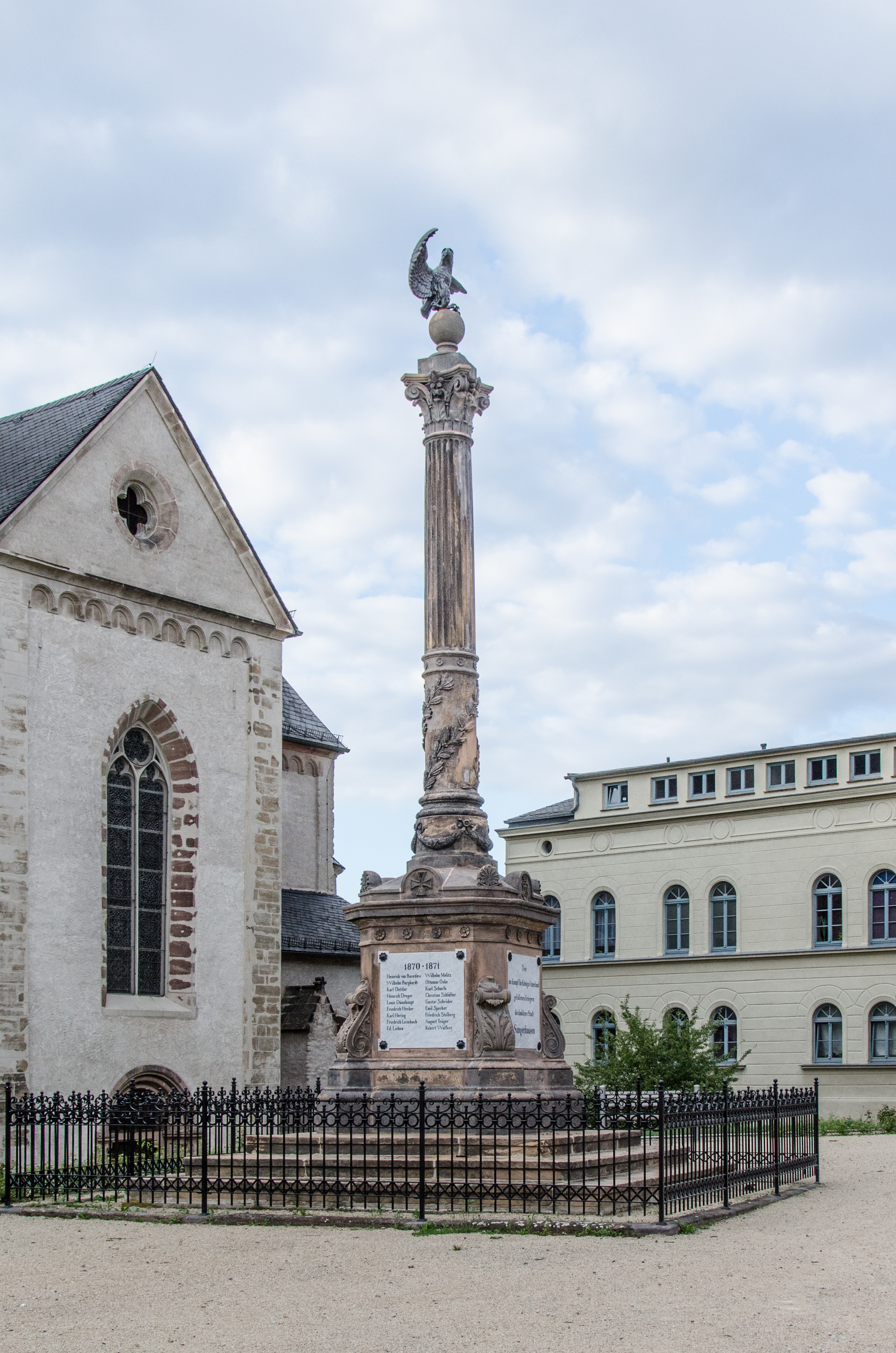 Sangerhausen, Ulrichstraße, Kriegerdenkmal